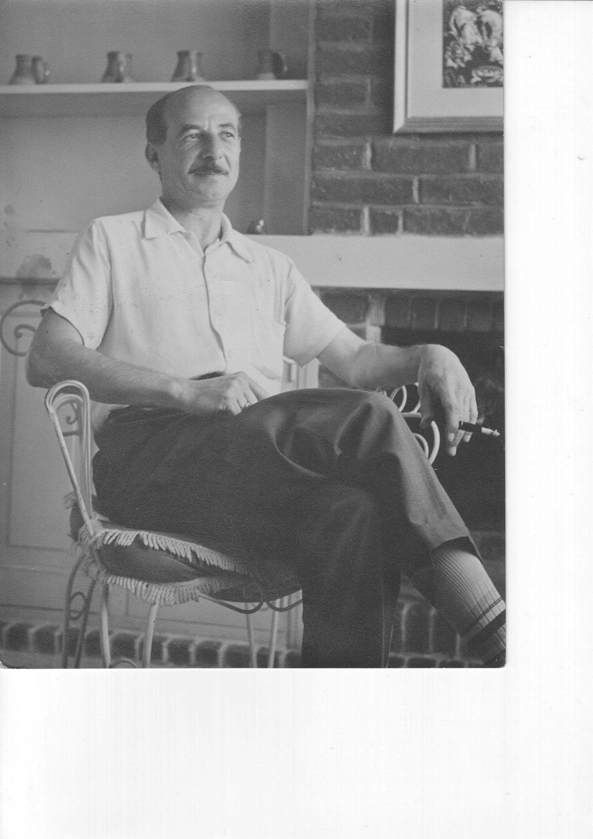 Fotos de José Rafael Cárrega Núñez